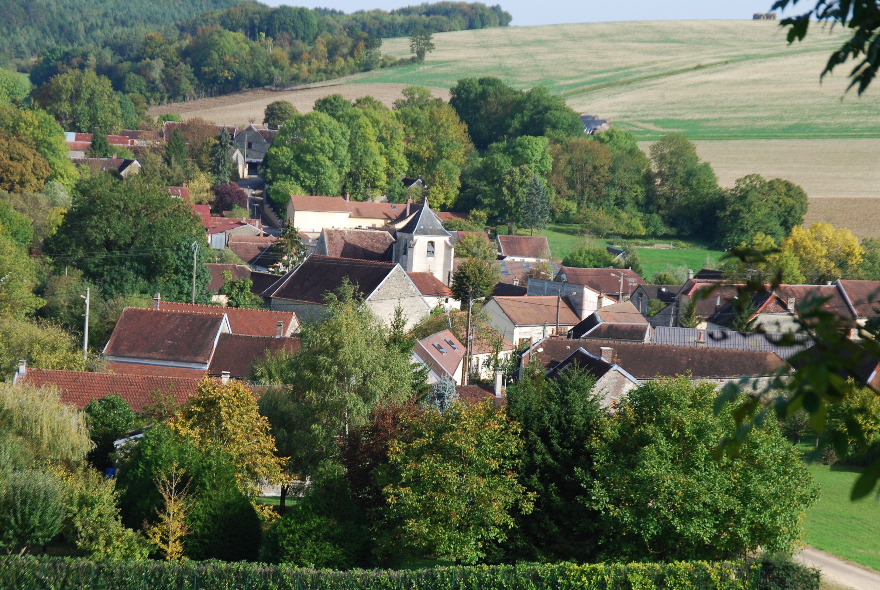 Le village, vu du coteau surplombant le cimetière à l'est. Téléobjectif.